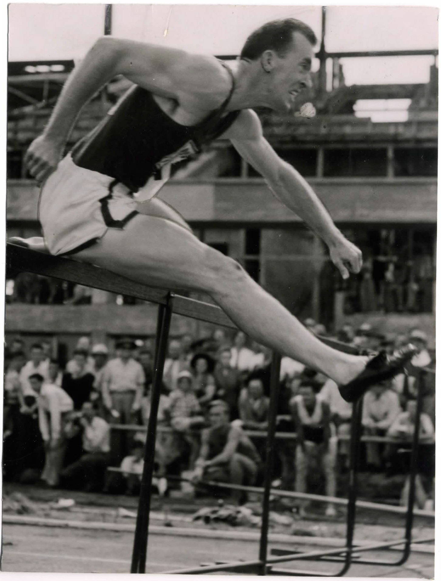 Ray Weinberg hurdler